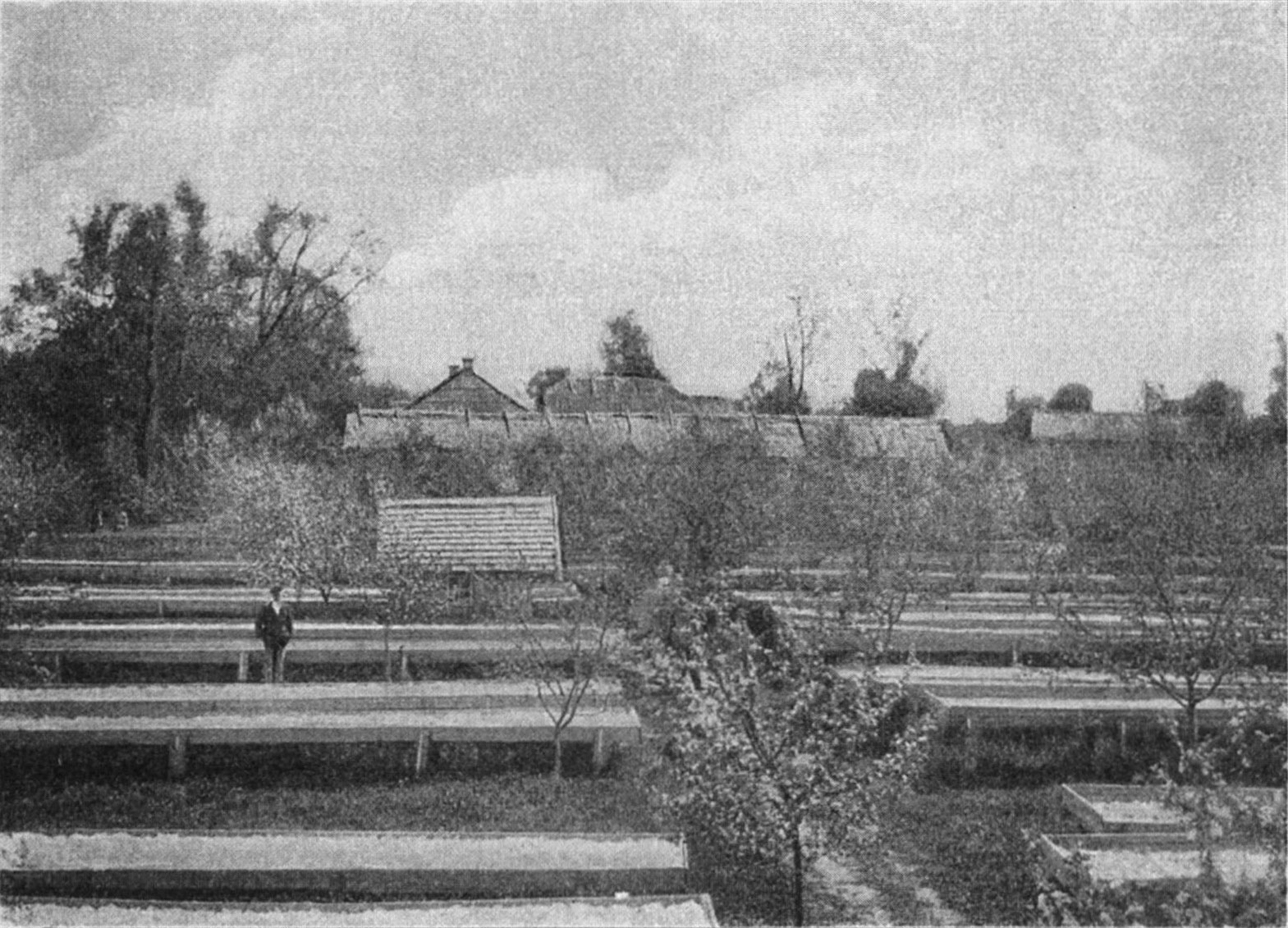 Беларуская (тарашкевіца): Буйнічы (Bujničy). Бяленьне воску пад сонцам на эпархіяльным сьвечачным заводзе